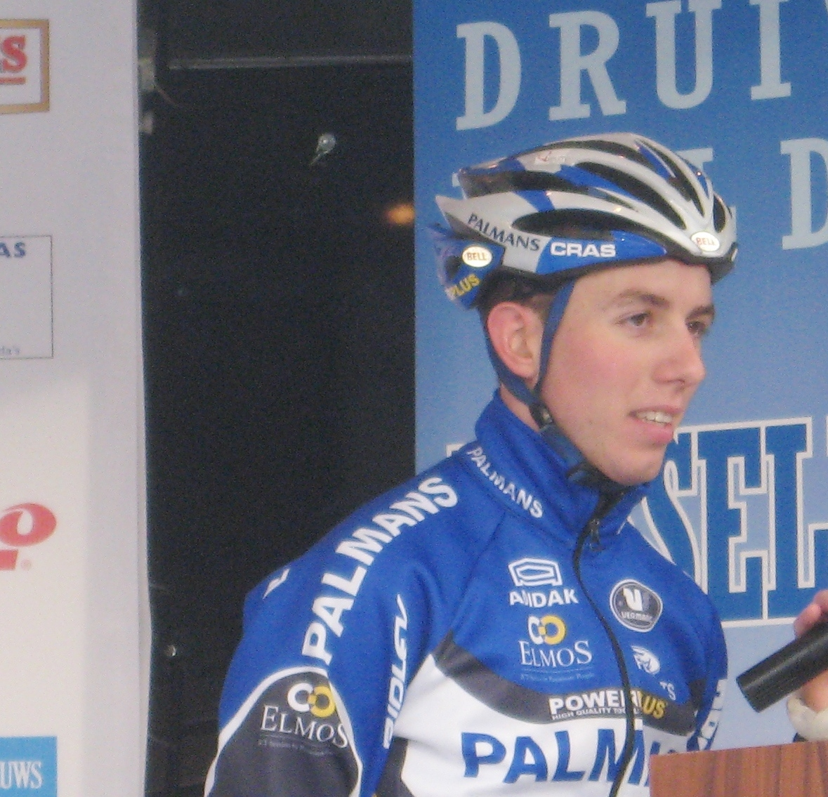 Philipp Walsleben at the cyclo-cross race of Overijse, Belgium